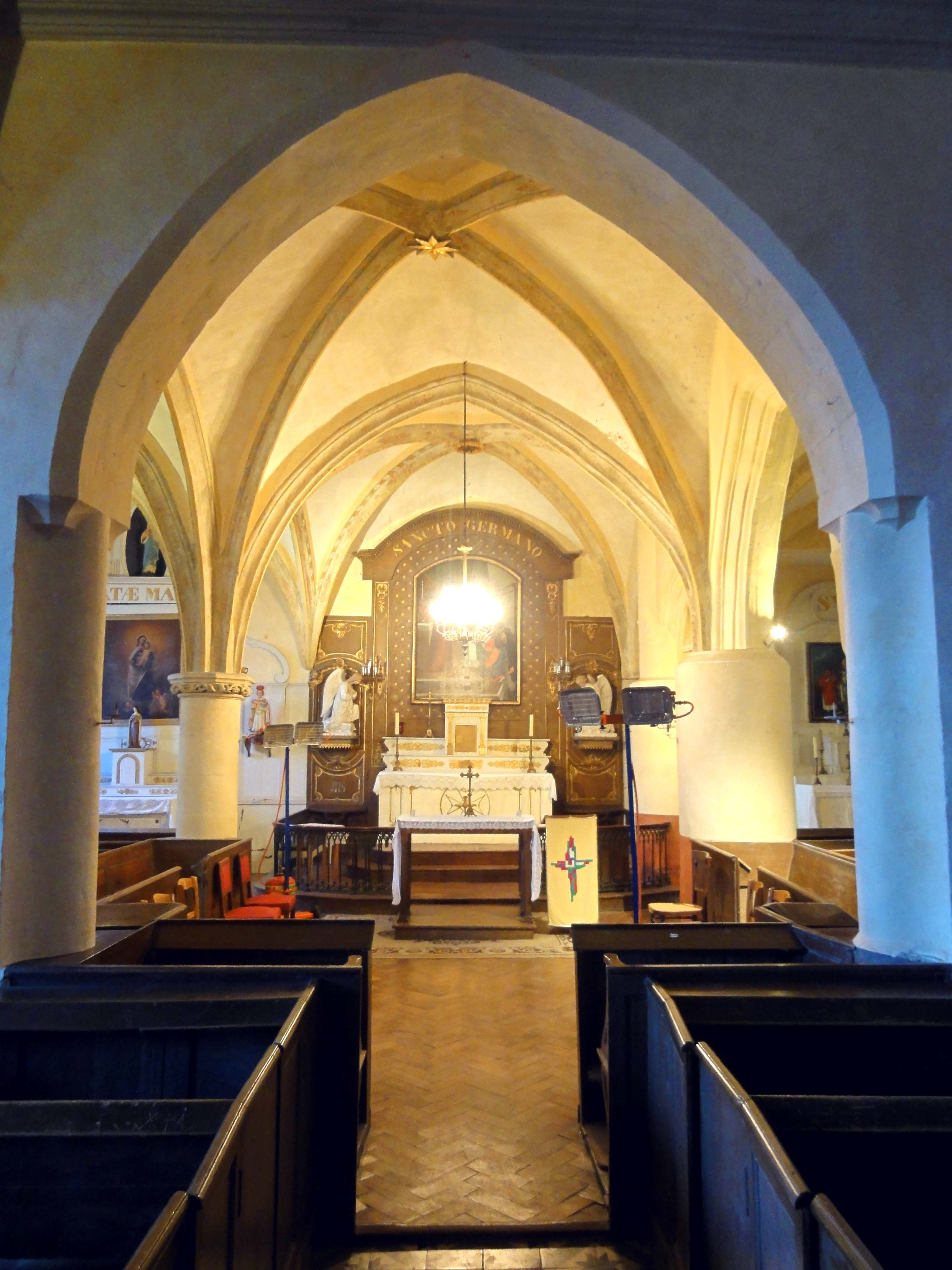 Intérieur de l'église - voir titre.